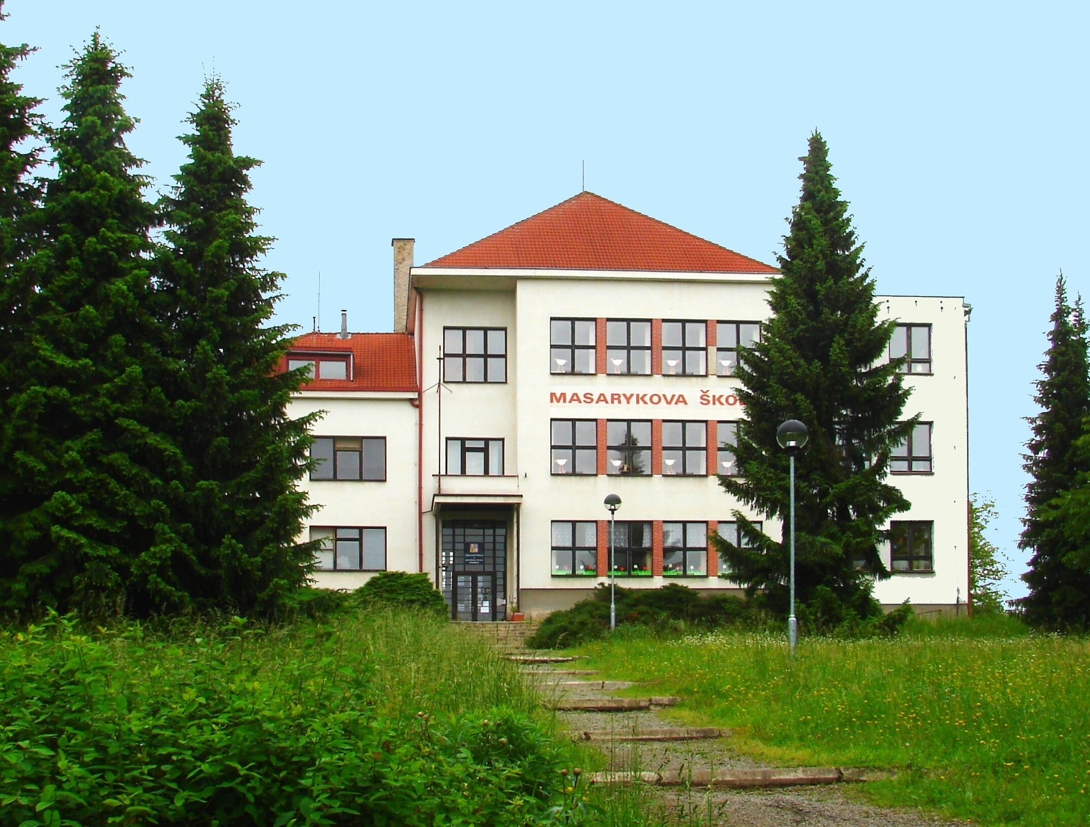 ZŠ Ohnišov